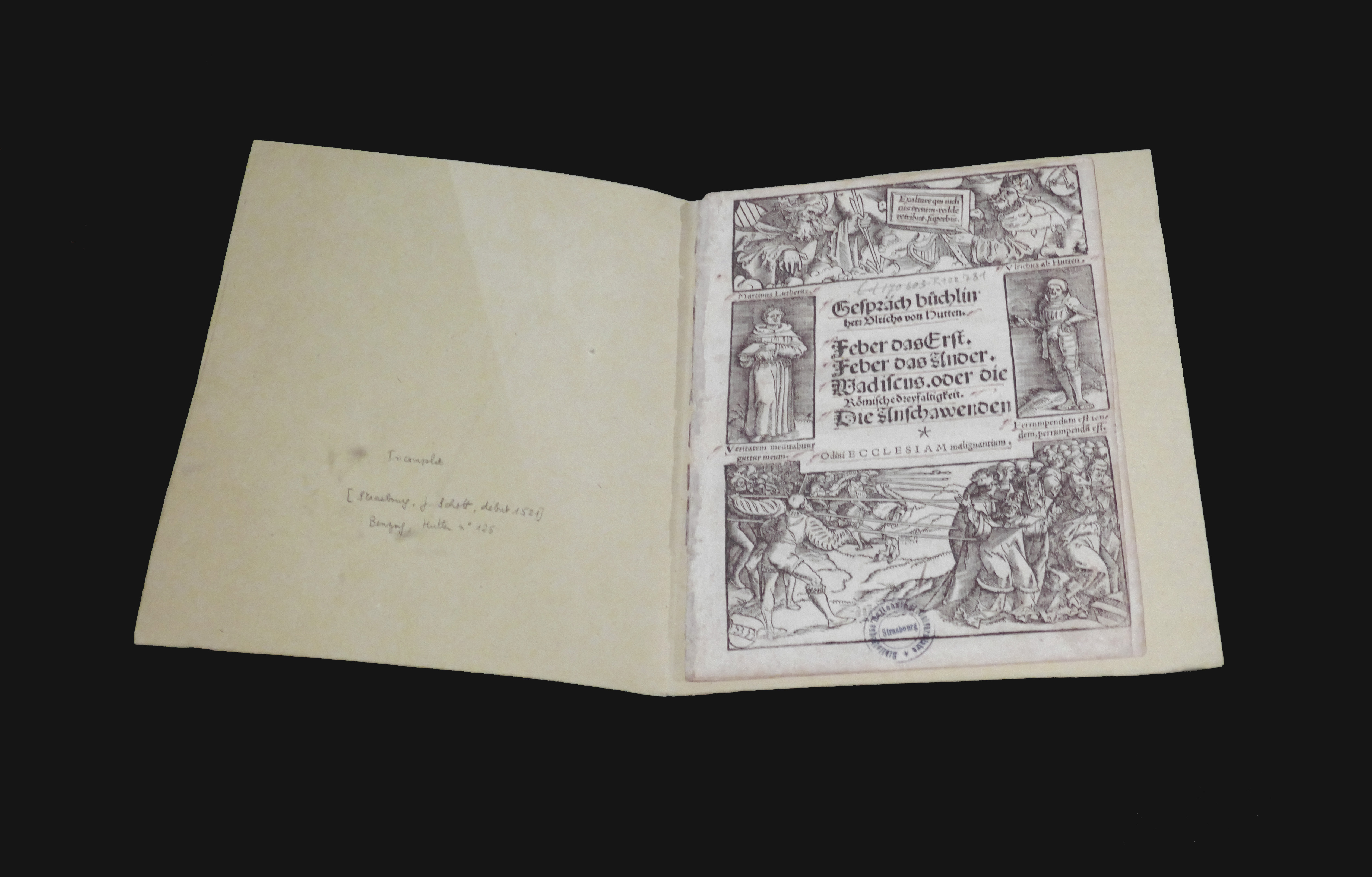 "Combat contre les dignitaires de l'Eglise" Hans Baldung Grien (ill.) Gravure de titre de Gesprächsbüchlein (J. Schott, 1521), par Ulrich von Hutten, Conservé à la Bibliothèque nationale et universitaire de Strasbourg, présenté lors de l'exposition Hans Baldung Grien au musée de l'Oeuvre Notre-Dame.